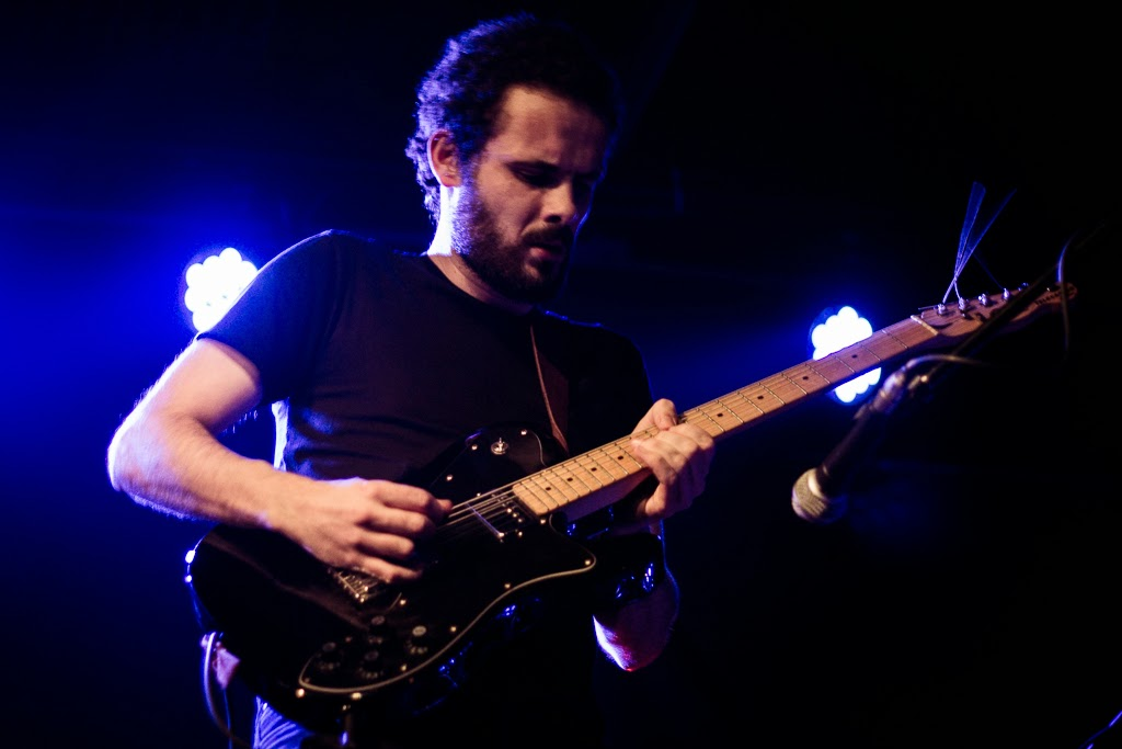 Maus Hábitos, 2014